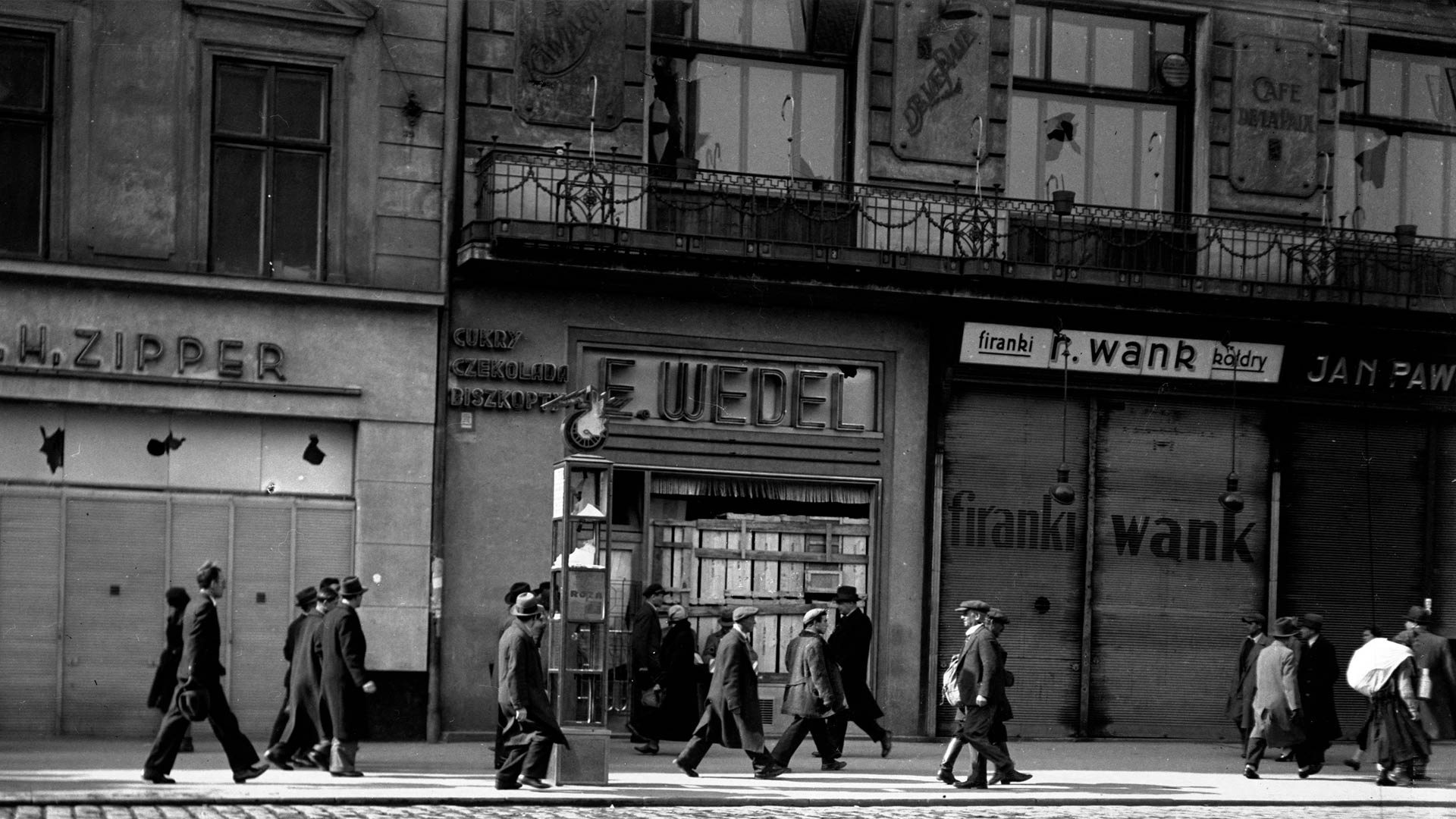 Львів